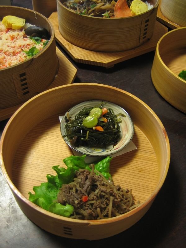 @takino, aizuwakamatsu, fukushima